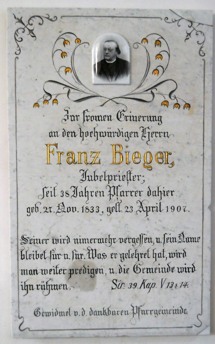 Genderkingen (Landkreis Donau-Ries), Pfarrkirche St. Peter und Paul, Gedenktafel für den Komponisten und Pfarrer Franz Anton Bieger